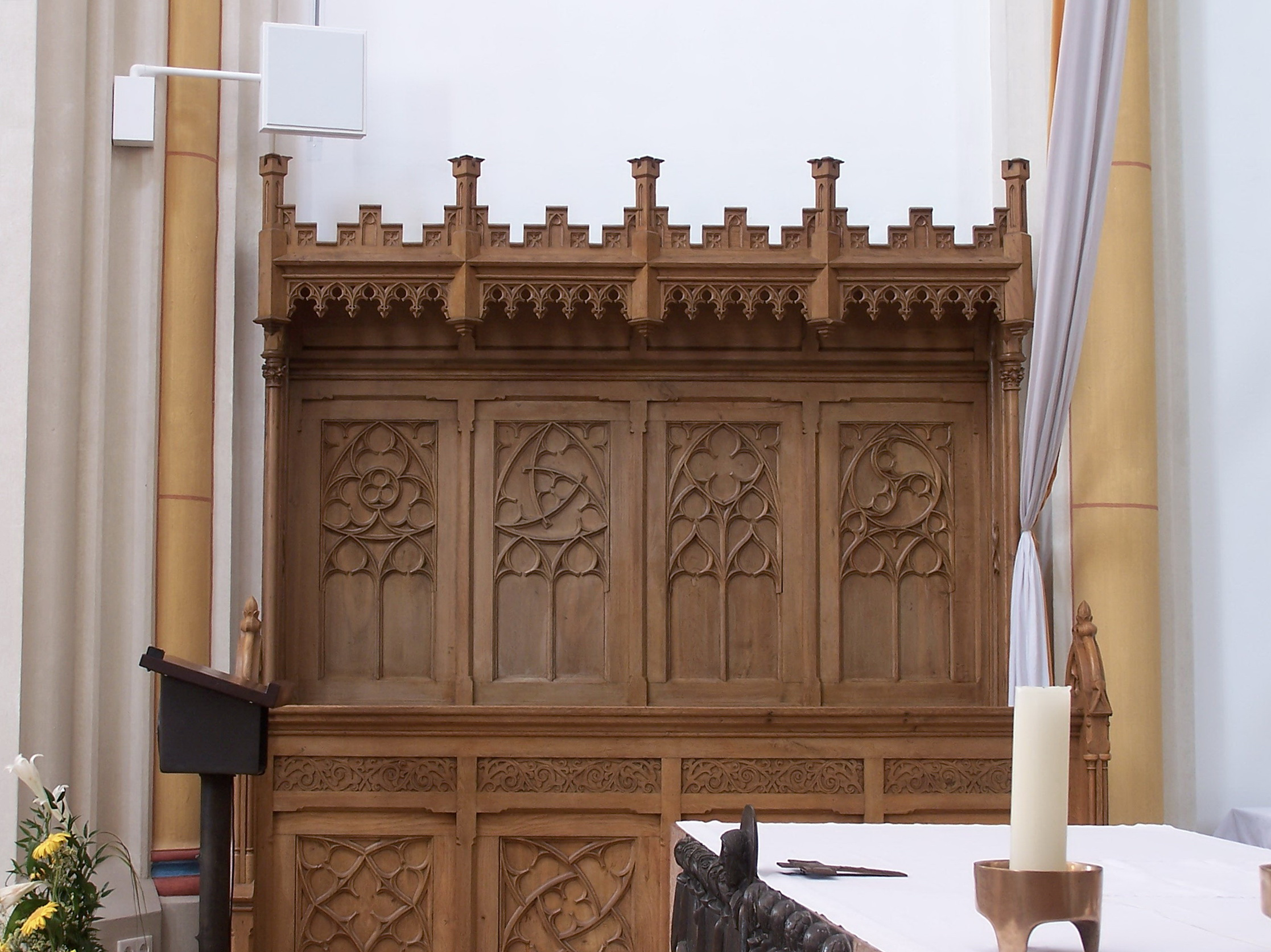 Pfeffenhausen, Kirchplatz 16. Katholische Pfarrkirche St. Martin. Neugotische Basilika, Blankziegelbau, nach Planung des königlichen Baumamtmanns Anton Völkl, 1885-87. Chorgestühl aus der Erbauungszeit.